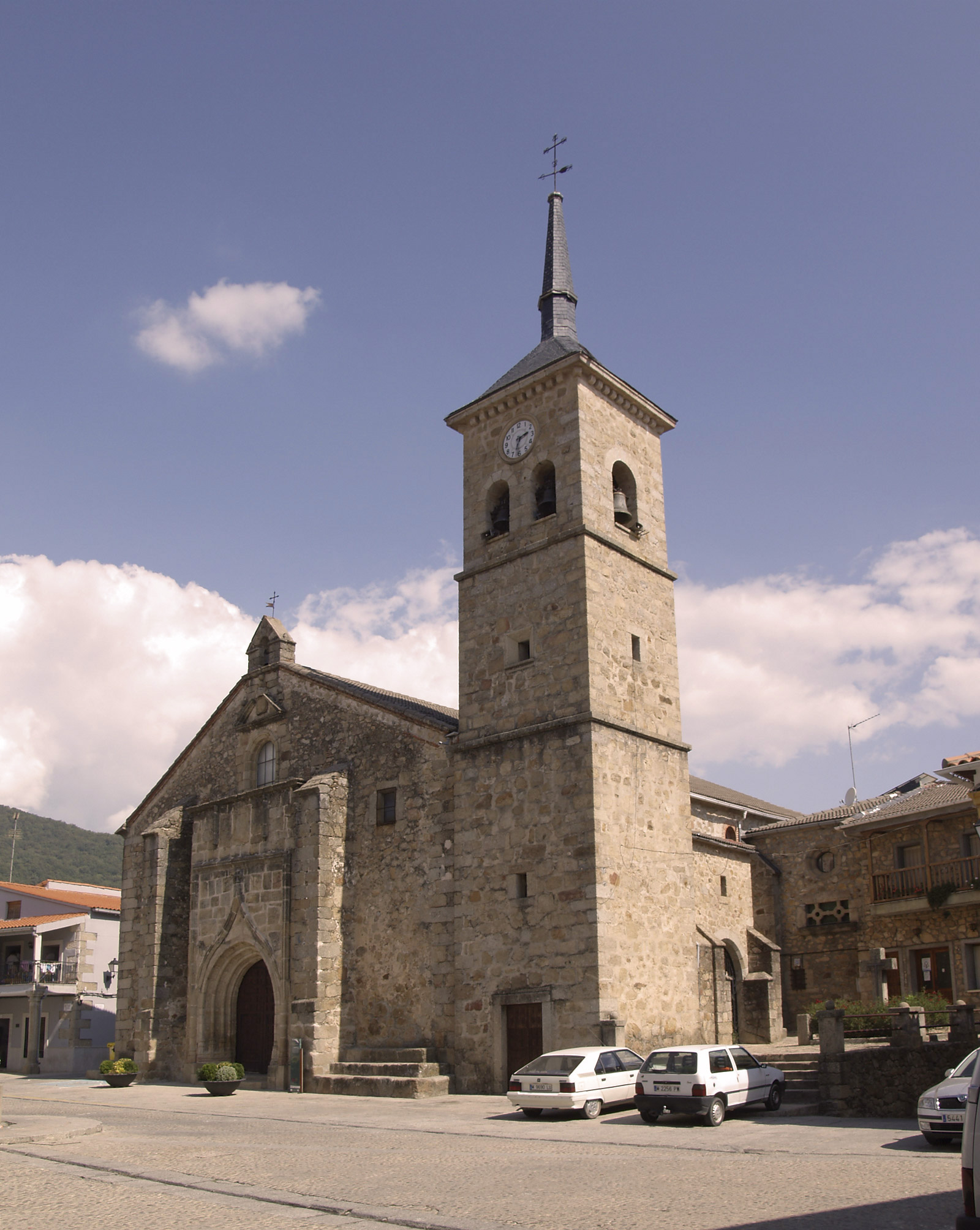 Iglesia parroquial de Santiago Apóstol, Losar de la Vera (Cáceres).